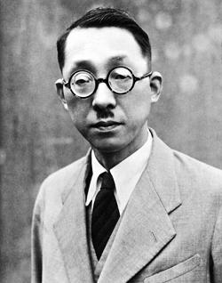 Josei Toda,Second Soka Gakkai president .